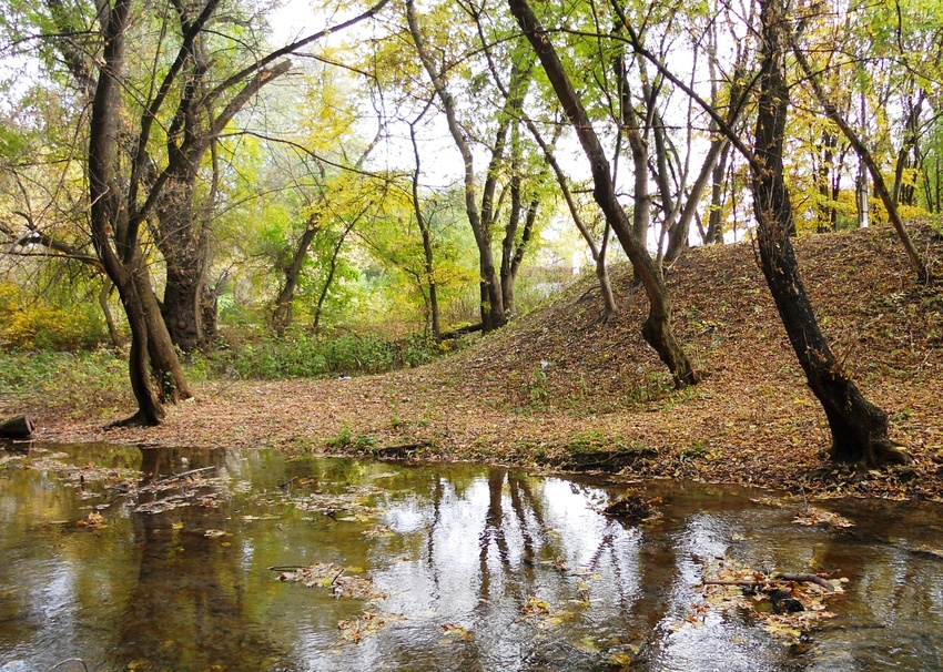 Ручей Шакой у села Янтарное Адыгэбзэ: ЩакIуеипс Янтарнэ къуажэ деж